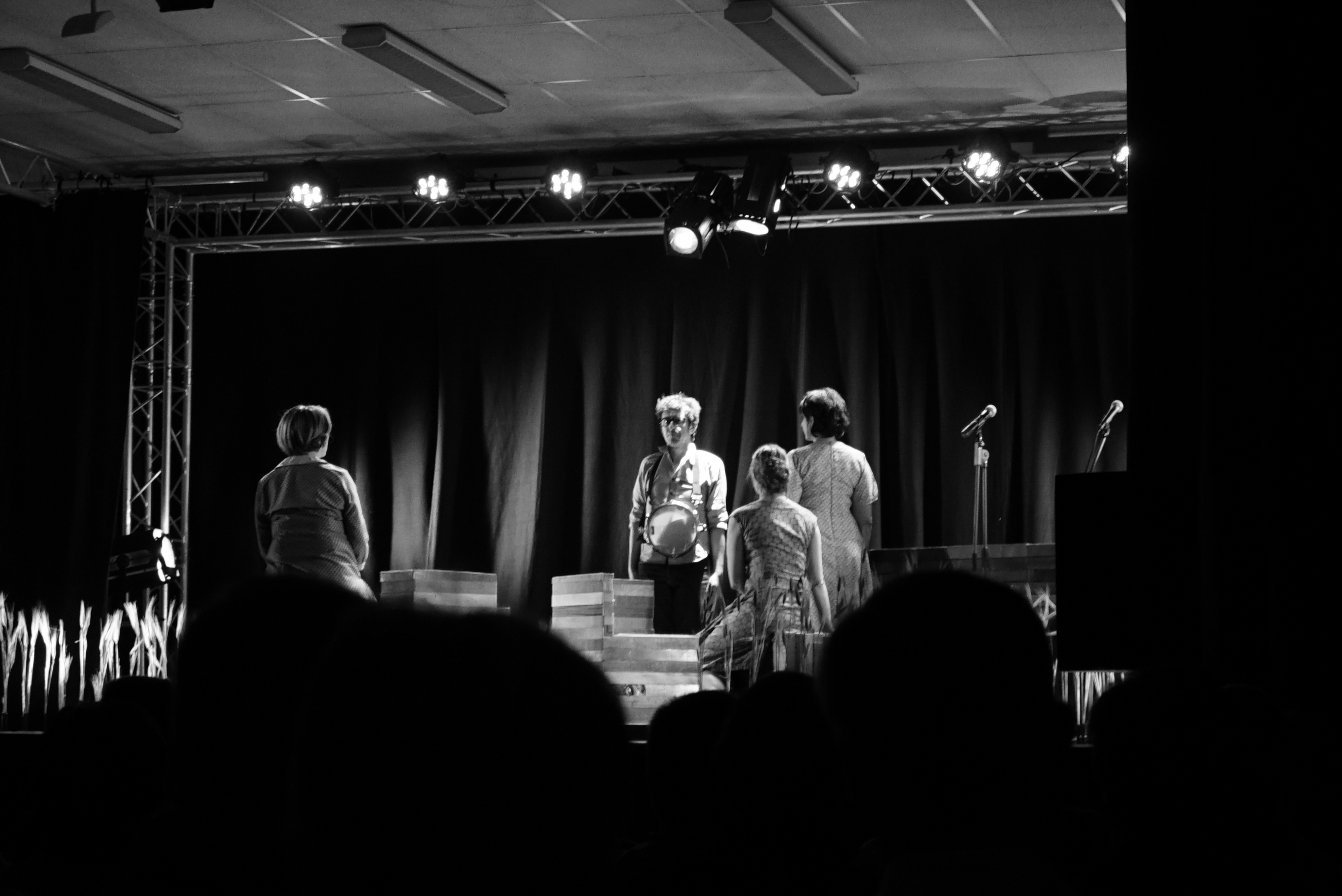 spectacle de la compagnie Ecart lors de la commémoration de l'offensive Nivelle dans la salle polyvalante de Corbeny.